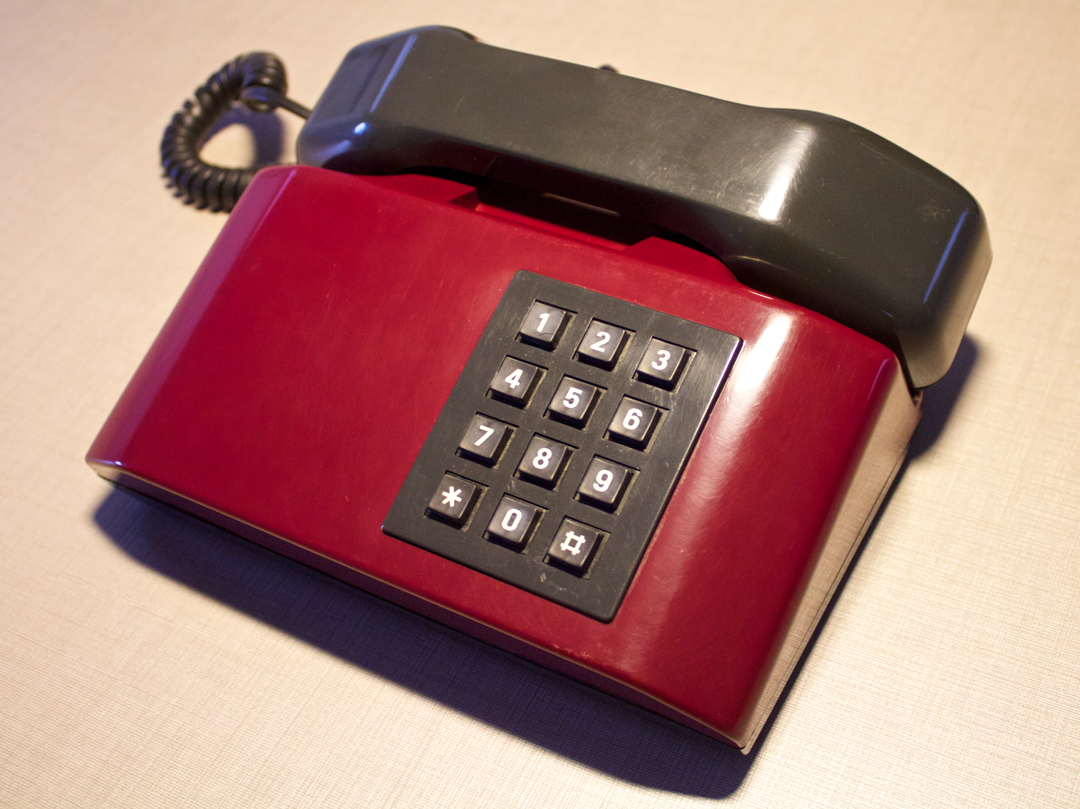 Telefono Pulsar, 1988